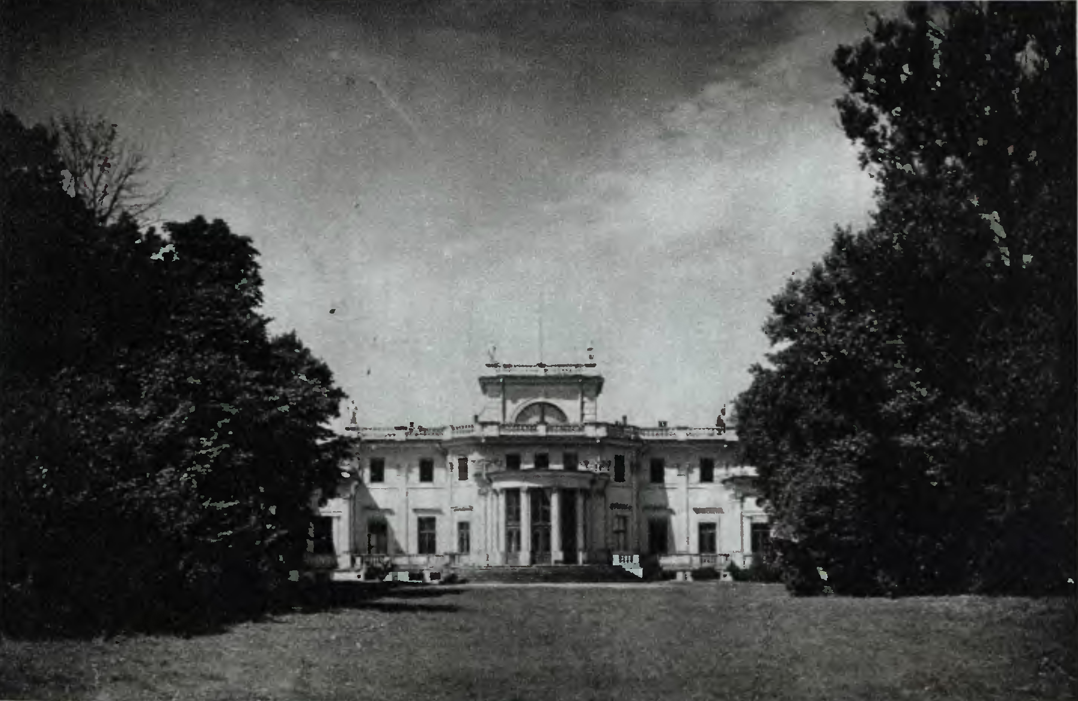 Беларуская (тарашкевіца): Вака (Vaka), сядзіба Тышкевічаў (Tyškievič)